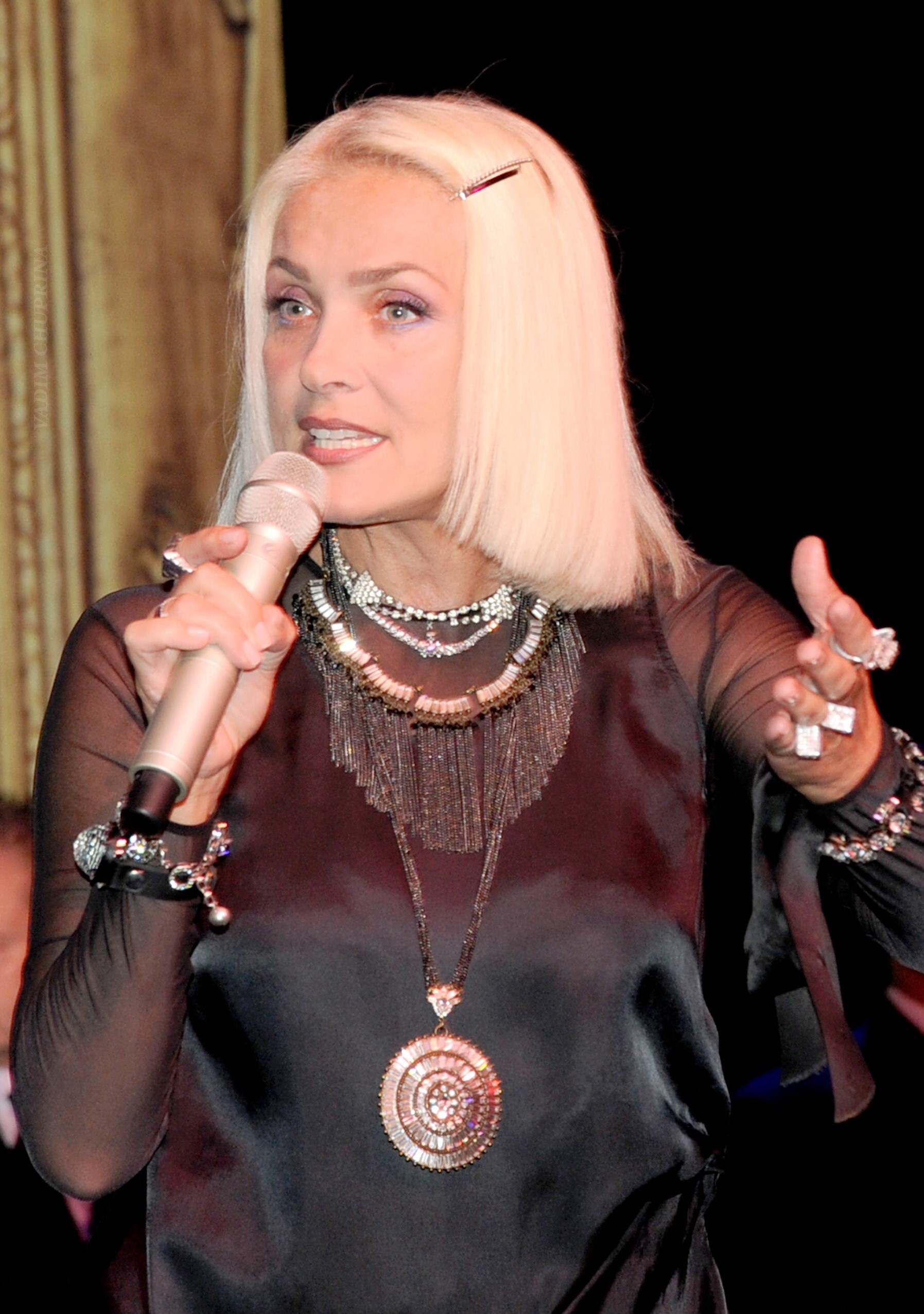 Вайкуле, Лайма Станиславовна 2011, фото Чуприна Вадим